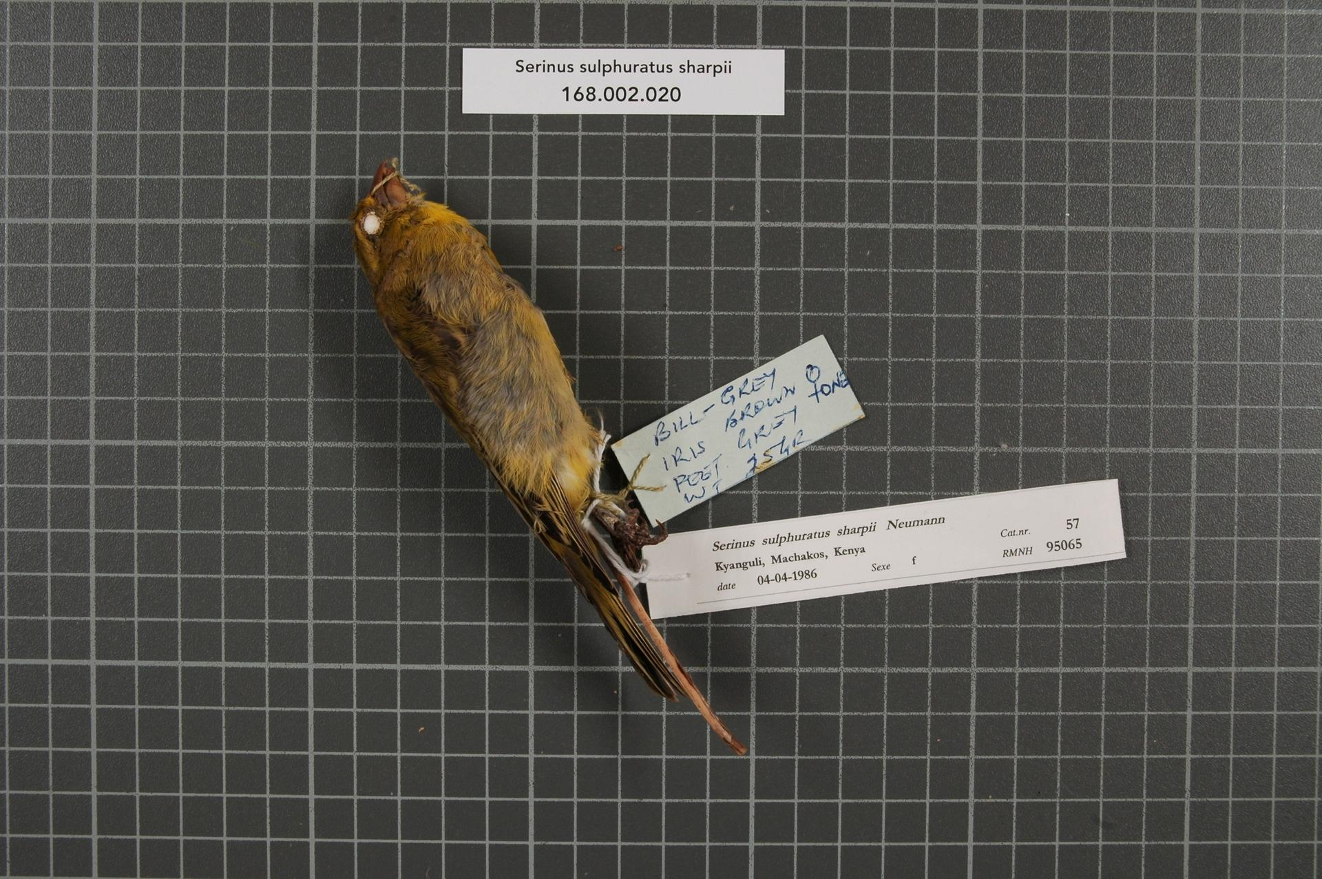 Serinus sulphuratus sharpii Neumann, 1900